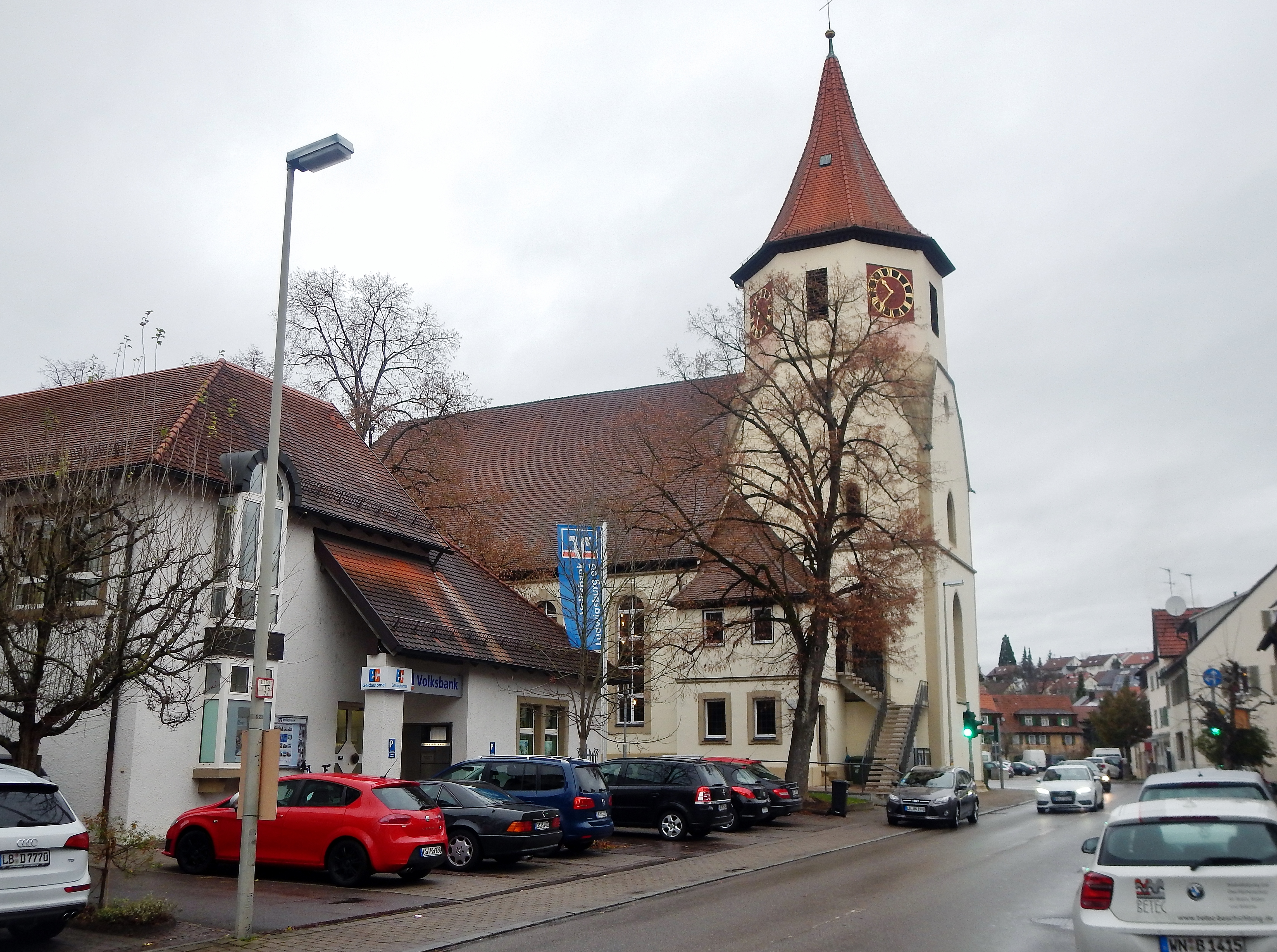 Kirche in Großbottwar